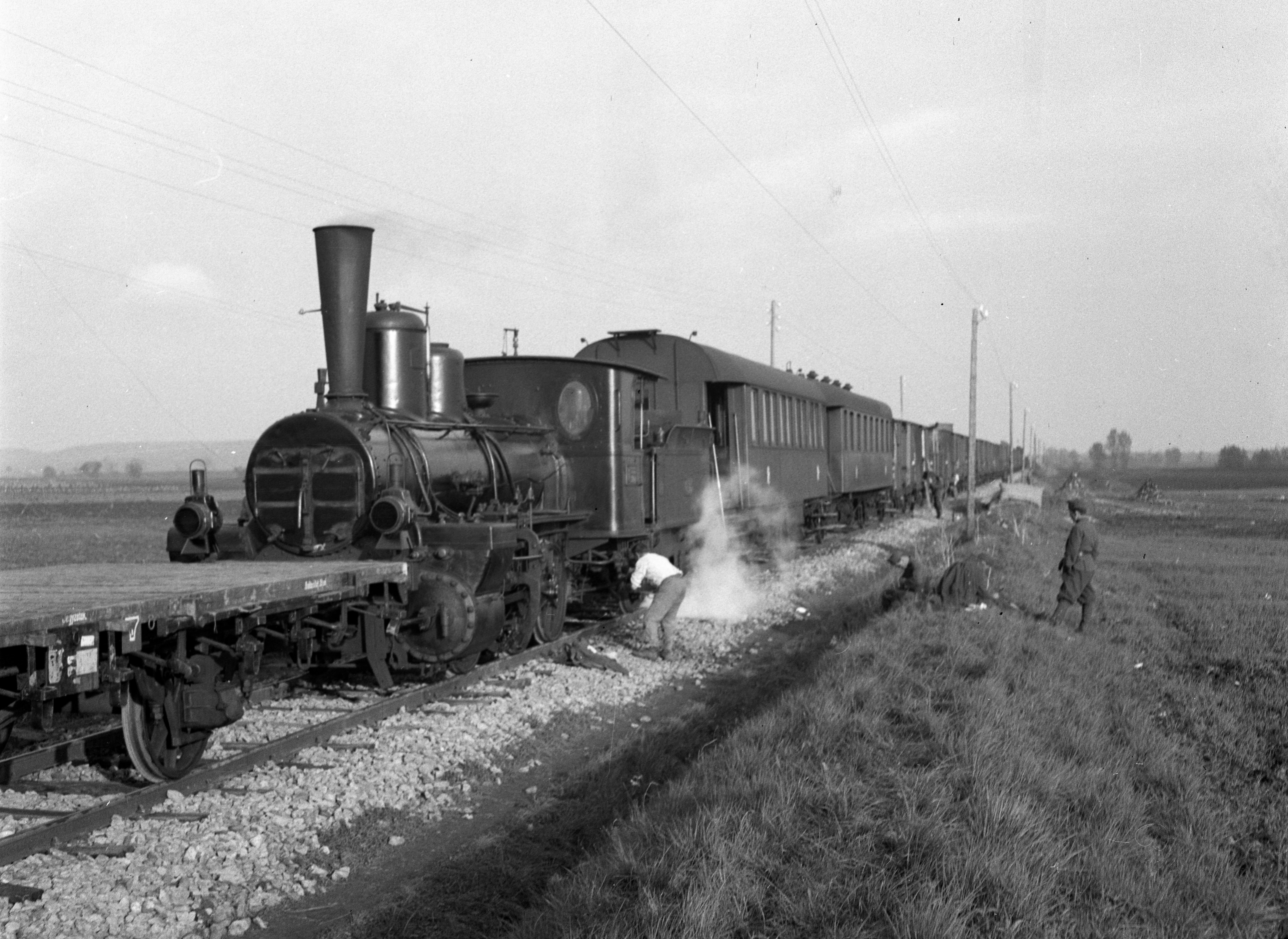 a vasúti hidak helyreállításakor használt vasúti szerelvény. Location: Croatia, Beli Manastir Tags: railway, steam locomotive, rail Title: a vasúti hidak helyreállításakor használt vasúti szerelvény.